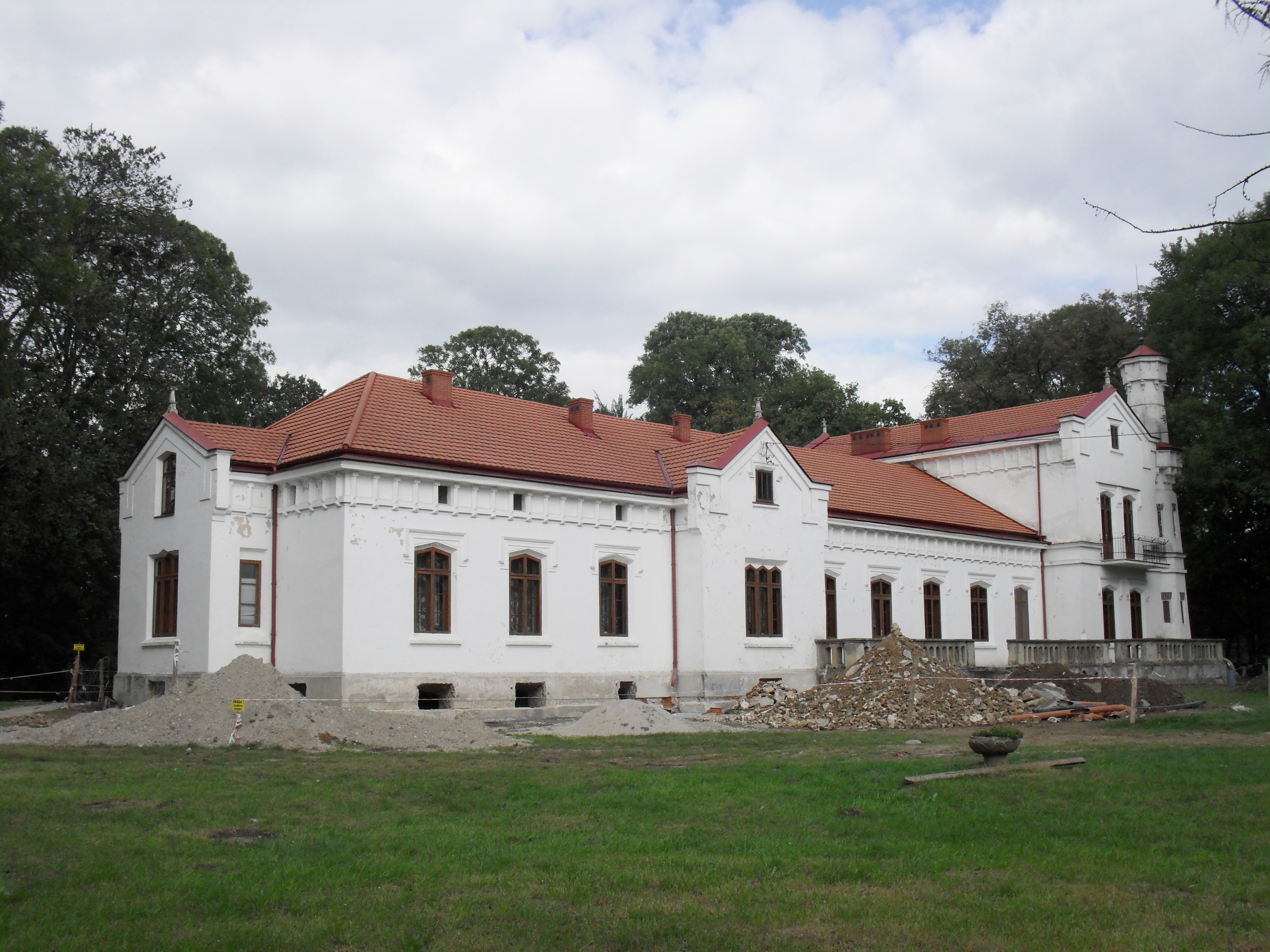 Szczurowa - zespół dworski: dwór, park, ogrodzenie z bramkami